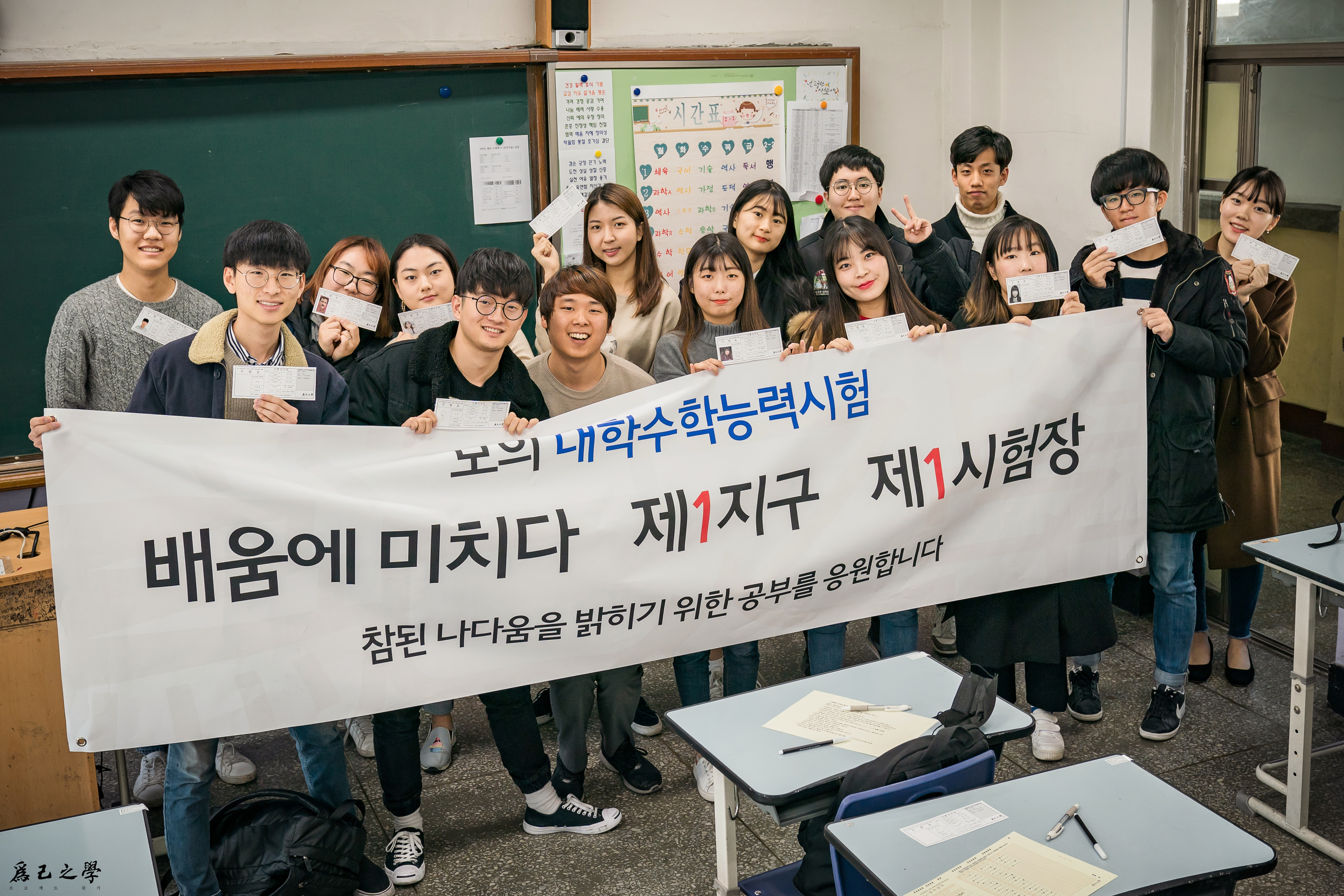 2018년 11월 17일, 2019 모의 대학수학능력시험 이후 단체사진을 찍고 있다.